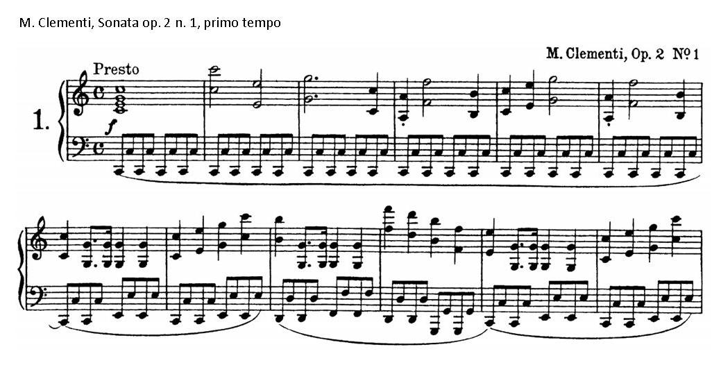 Si tratta di un esempio di Basso di Murky, accompagnamento pianistico in ottave spezzate.